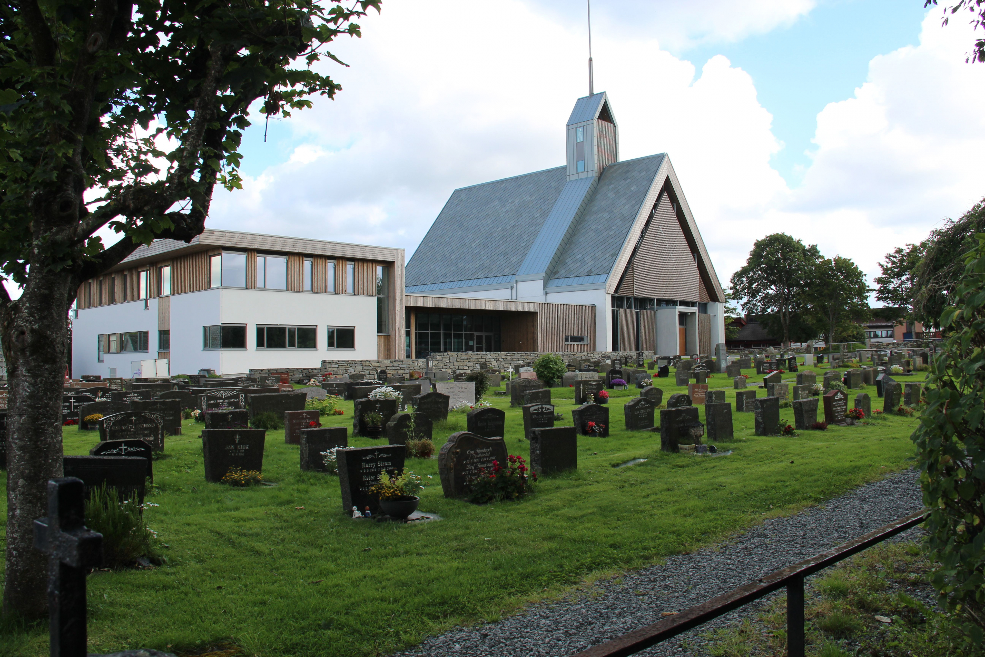 Kopervik kirke, vigslet 2017. Foto: Bertha Aarø, fra Riksantikvarens Kulturminnesøk.